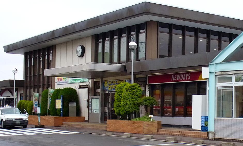 岩沼駅 Iwanuma Station. East Japan Railway Co.